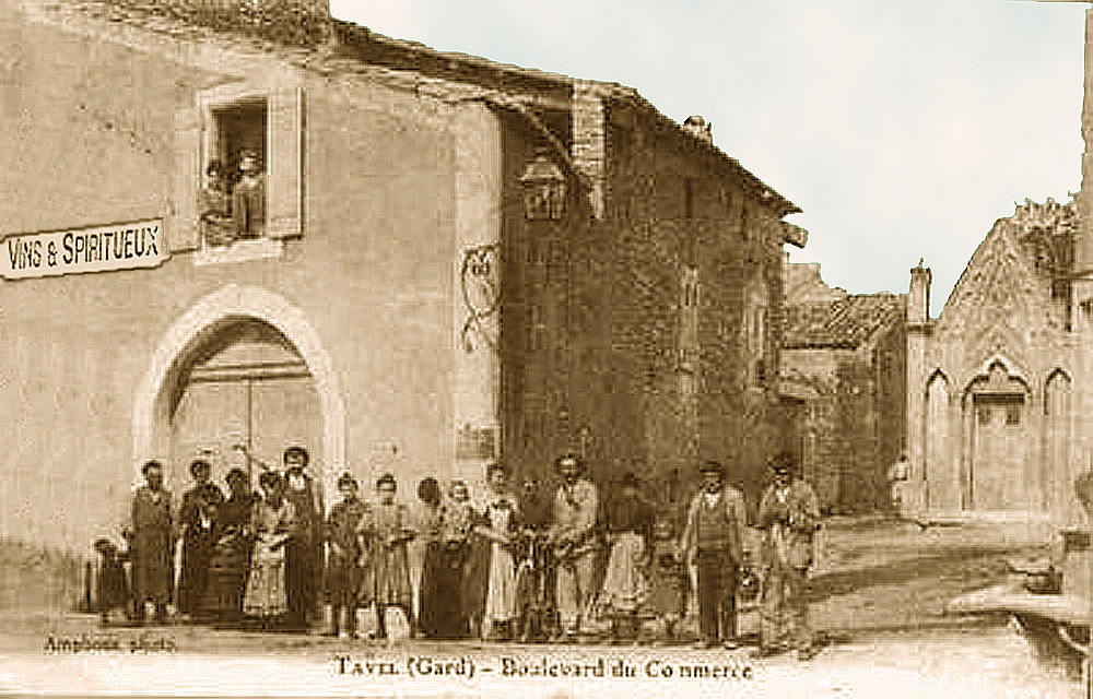 Boutique de vins et spiritueux sur le boulevard du Commerce à Tavel au début du XXe siècle